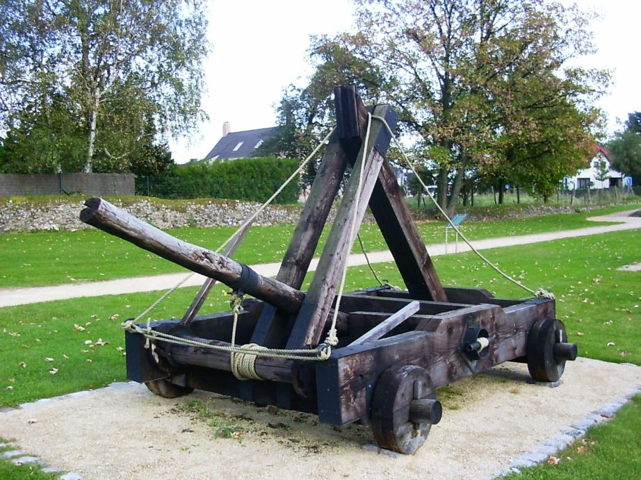 katapult te Tongeren